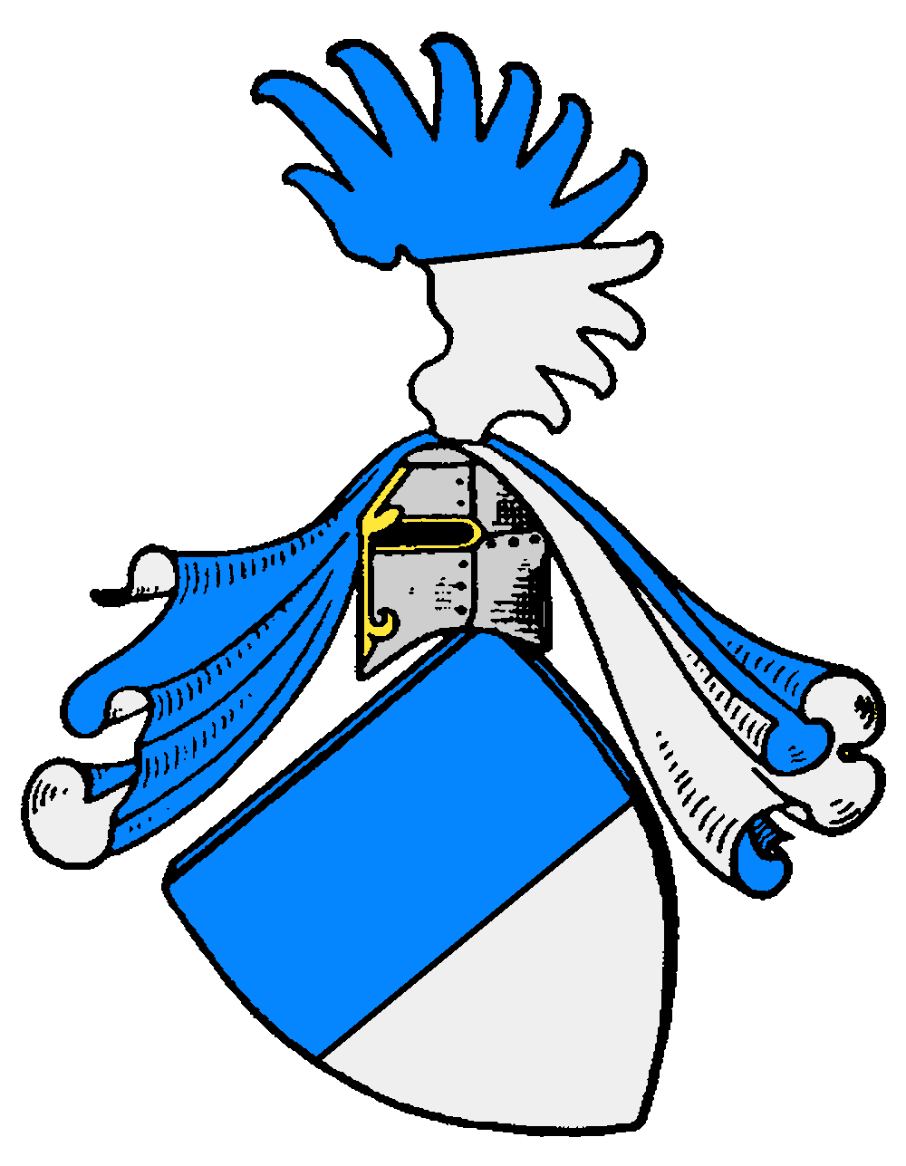 Wappen der Stein von Hilpoltstein